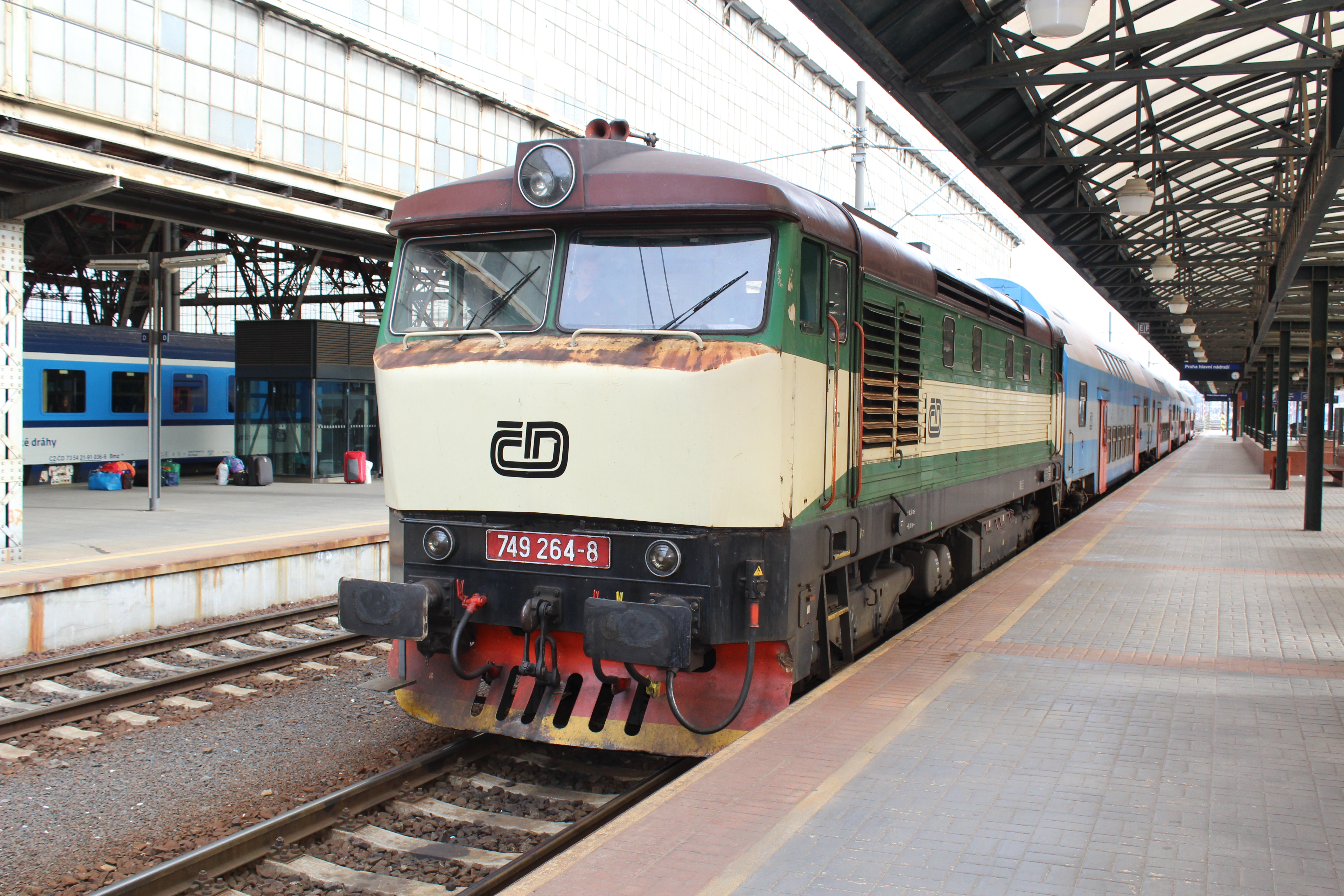 Motorová lokomotiva řady 751 nebo T 478.1 jak byla označována do roku 1988. Skříňová čtyřnápravová dieselová lokomotiva. Uspořádání pojezdu Bo- Bo . Označována přezdívkou Zamračená,nebo Bardotka podle charakteristických oken a tvarování čela lokomotivy. Podle zkušeností v provozu je považována za jednu z nejlepších lokomotiv ČKD Praha. ČKD ji vyrábělo v letech 1964 - 1971. Parametry elektrický stejnosměrný přenos výkonu, max. povolená rychlost 100 km/h, trvalá tažná síla lokomotivy 120 kN, maximální tažná síla 220 kN, hmotnost 75 tun. Část strojů byla v 90. letech vybavena zařízením pro elektrické vytápění vlaků a označována jako řad 749.